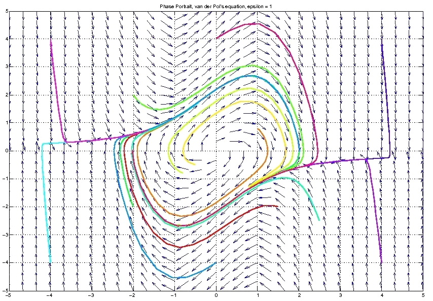 Phase portrait of van der Pol's equation, d 2 y d t 2 + ϵ ( y 2 − 1 ) d y d t + y = 0 , ϵ = 1 {\displaystyle {\frac {d^{2}y}{dt^{2 }+\epsilon (y^{2}-1){\frac {dy}{dt +y=0,\quad \epsilon =1}